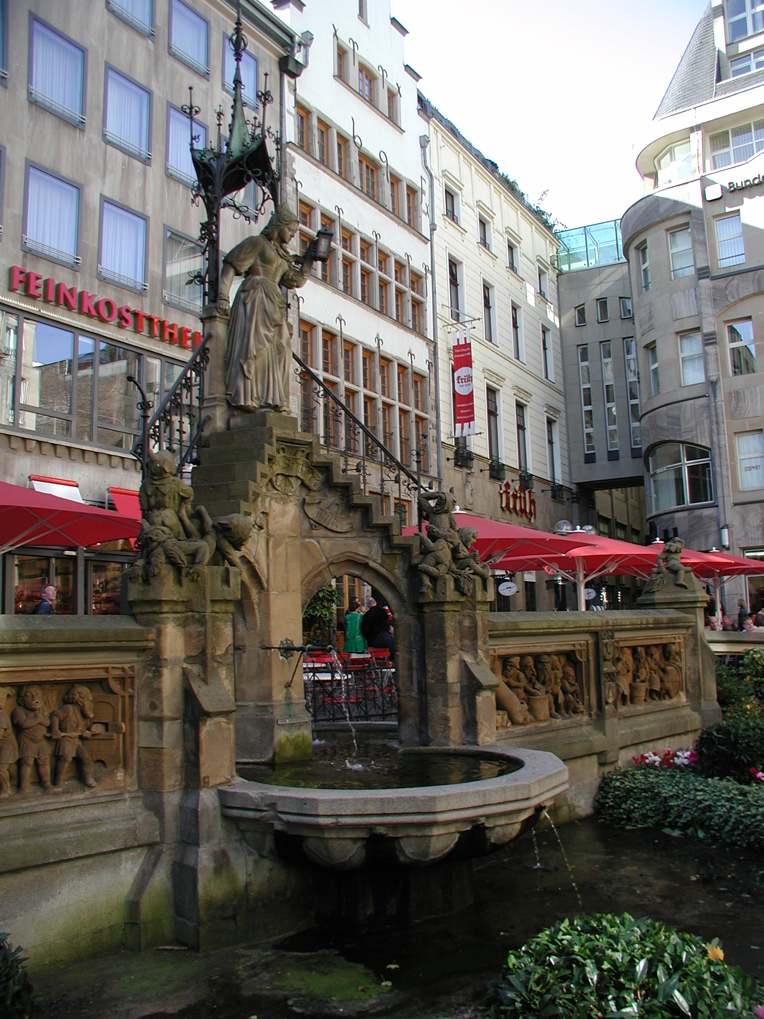 Koeln-Altstadt